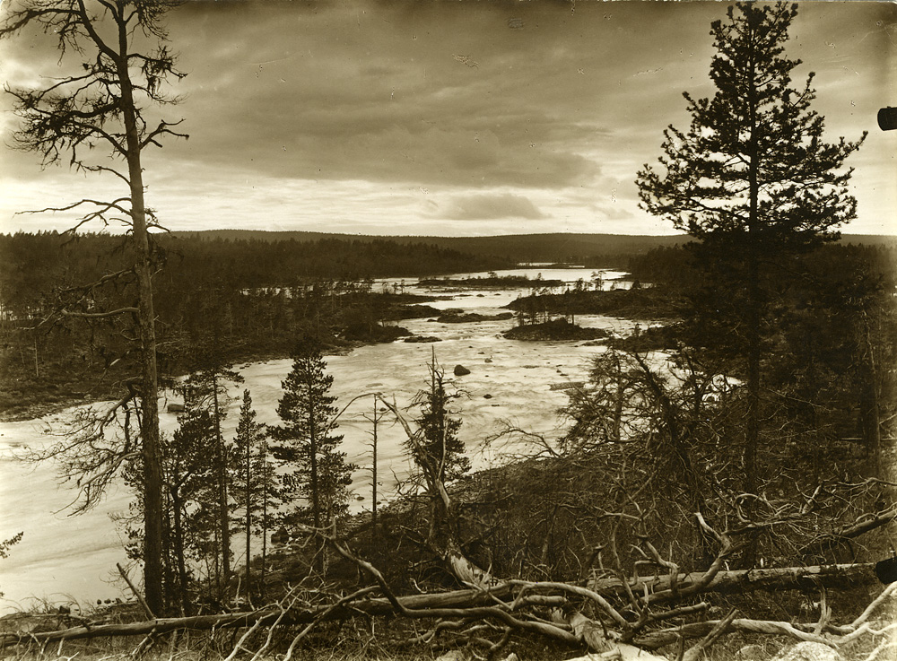 Wessel, Ellisif Rannveig Landskap, elv i bakgrunnen, foran furuskog med veltede trær. Grensefoss, Pasvik NMFF.002109